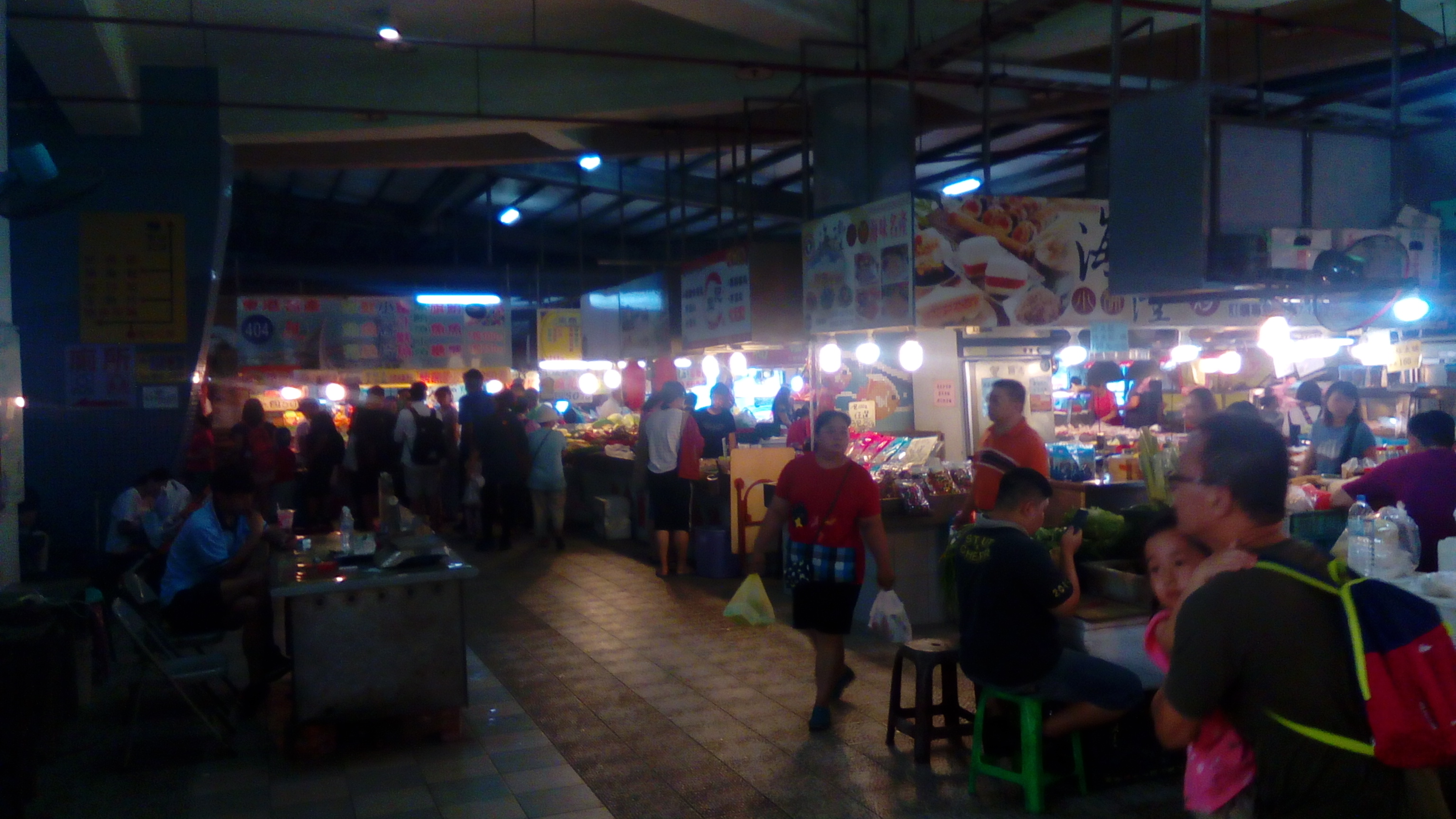 中一區 又適逢周日 萬頭欑動